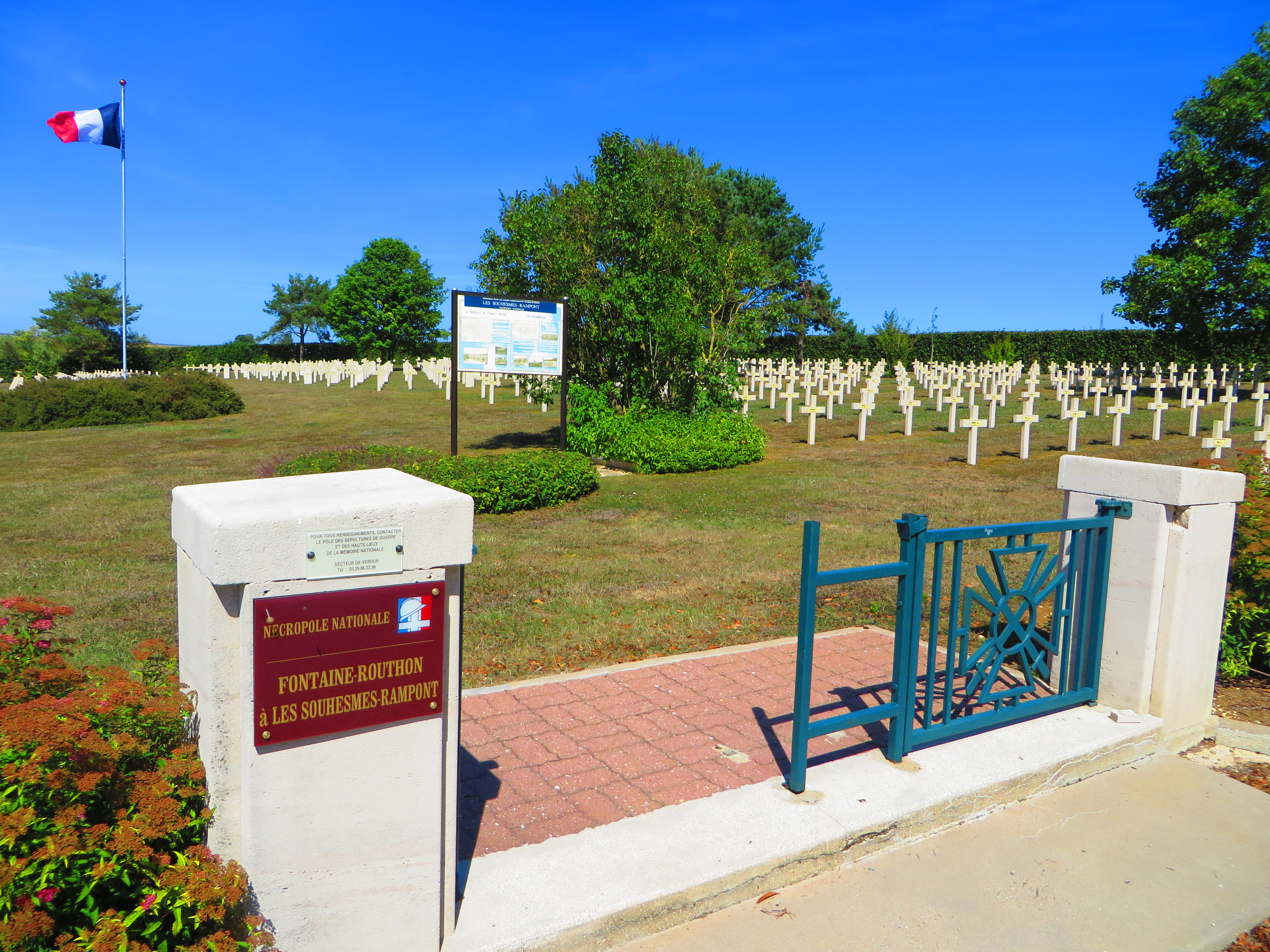 Les Souhesmes-Rampont Nécropole française de Les Souhesmes-Rampont